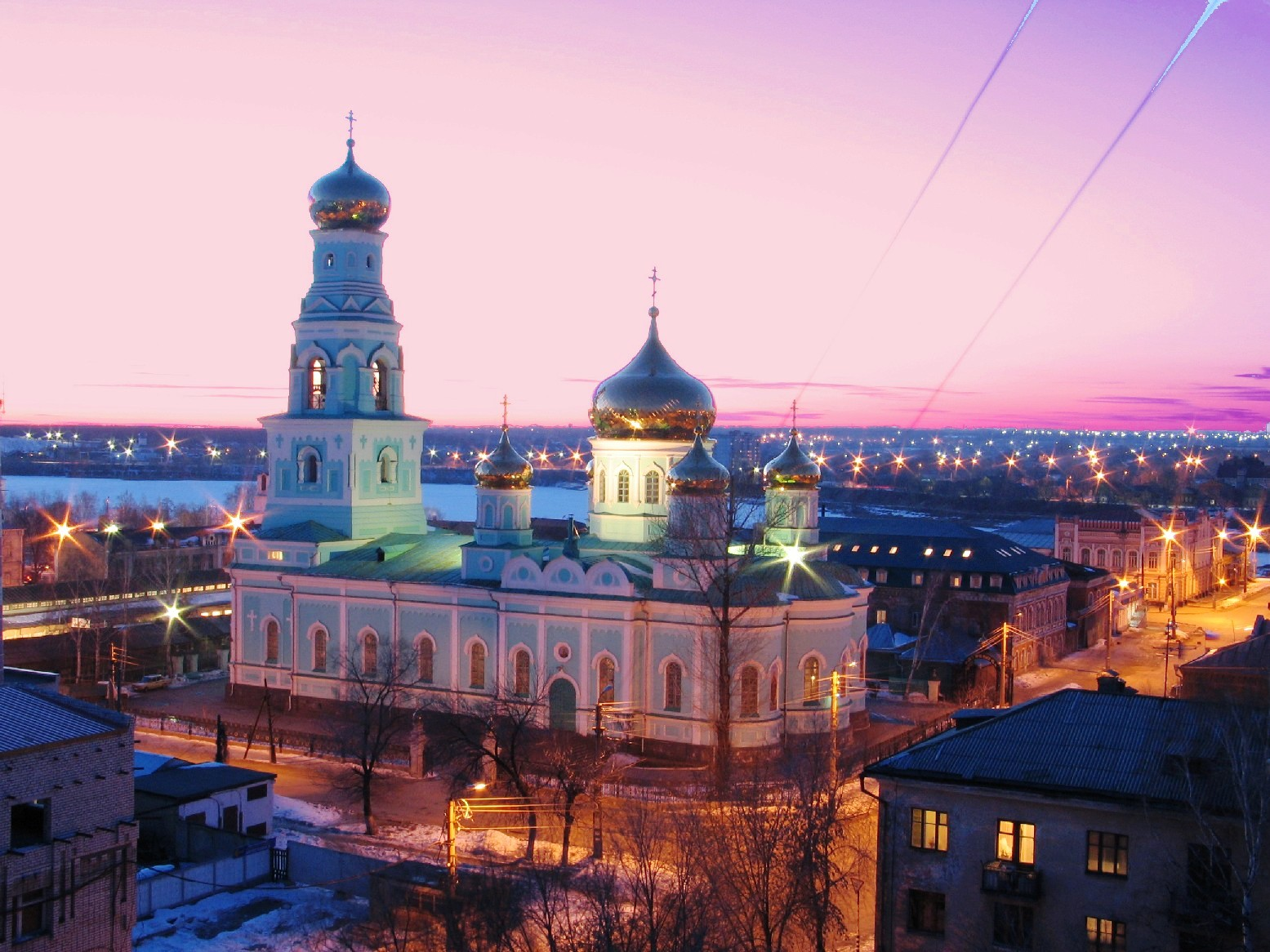 Кафедральный собор в честь Казанской иконы Божией Матери, г. Сызрань, Самарская обл.